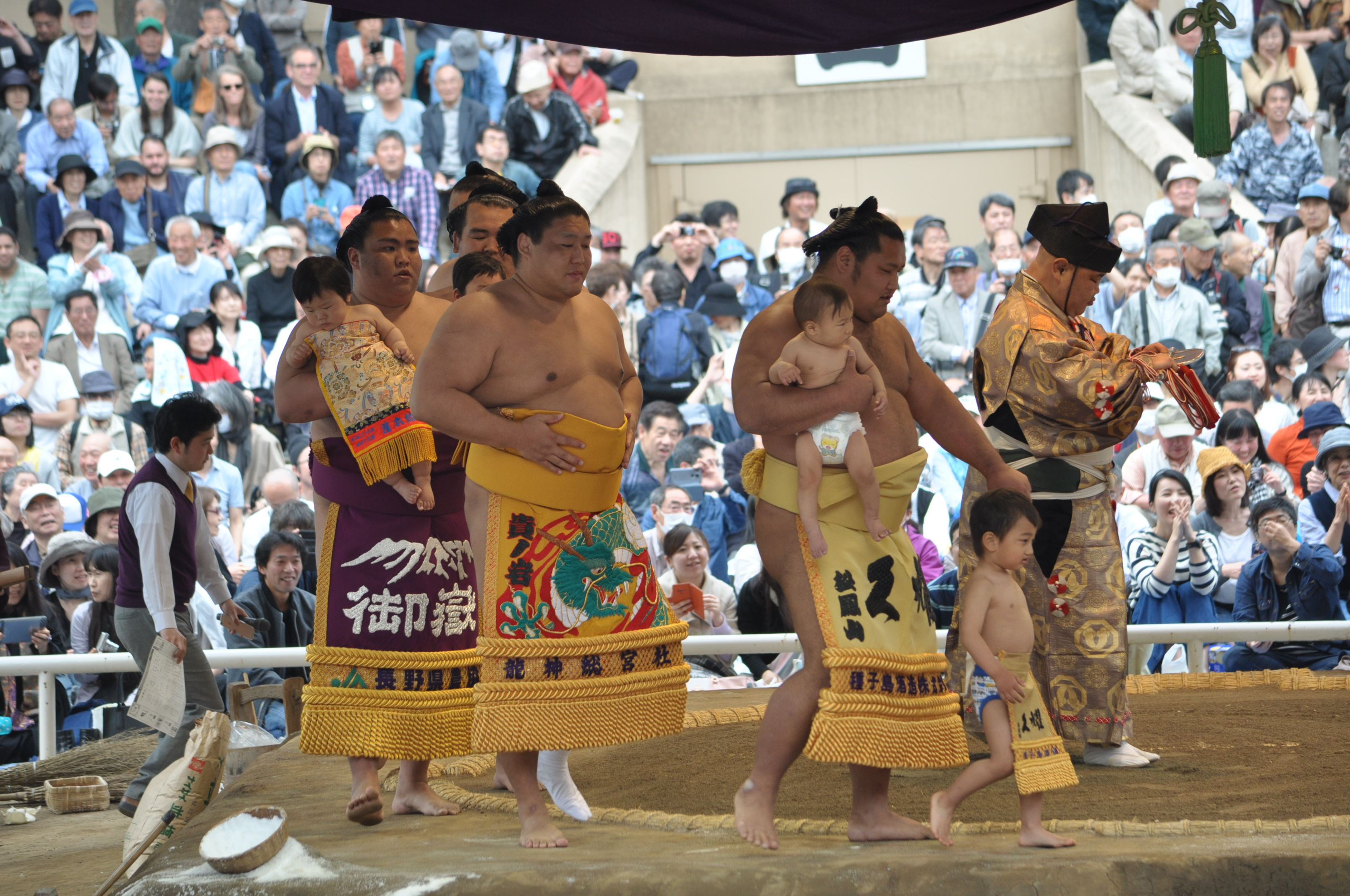 御嶽海 久司